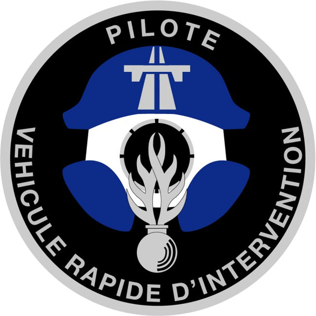 Écusson de pilote de Véhicule Rapide d'Intervention (VRI) des Équipes Rapides d'Intervention (ERI, ex-BRI).